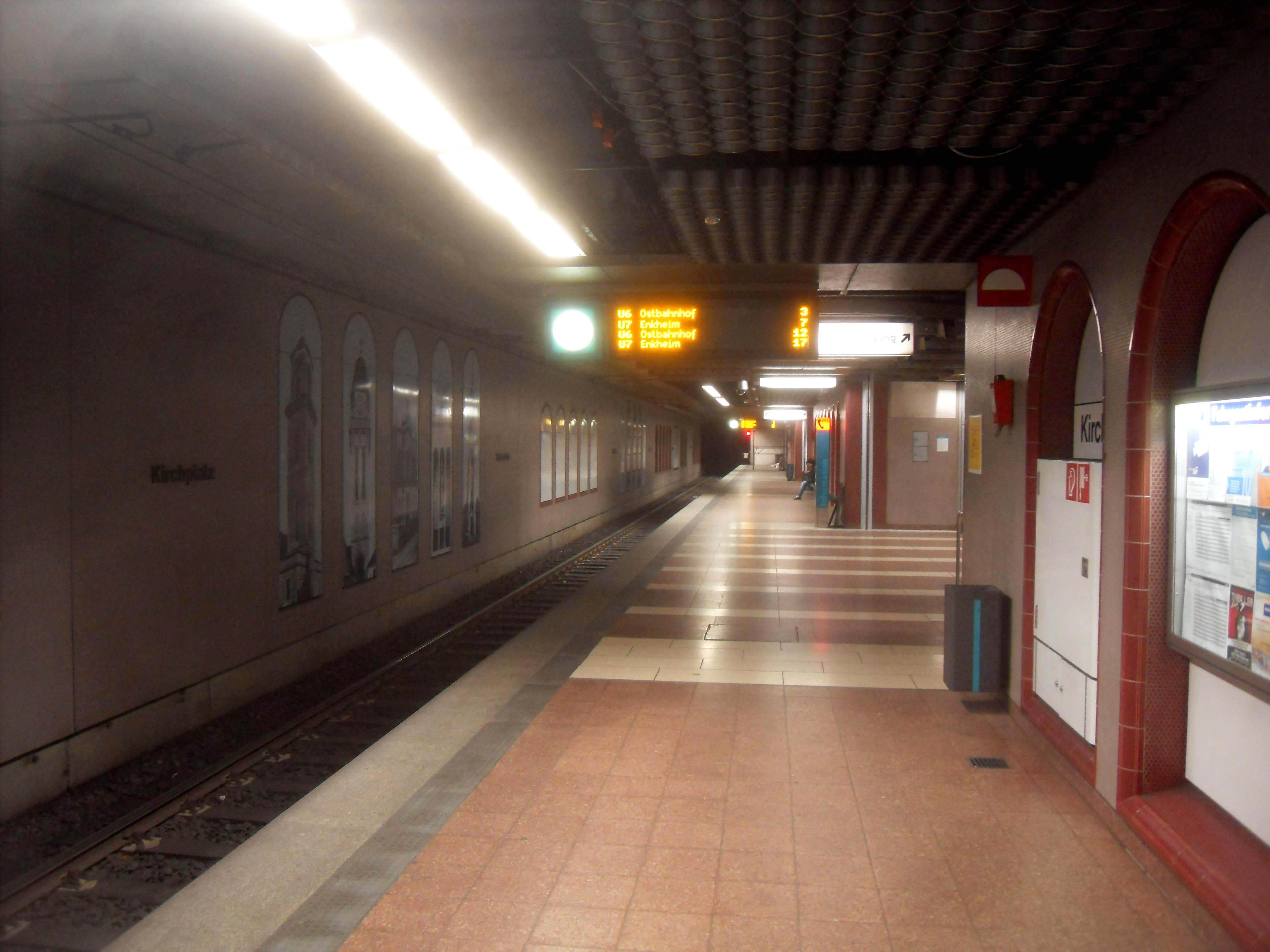 Bahnsteig des U-Bahnhofs Kirchplatz (Richtung Frankfurt-Bergen-Enkheim) der U-Bahn Frankfurt auf den Linien U 6 und U 7 in Hessen (Deutschland)